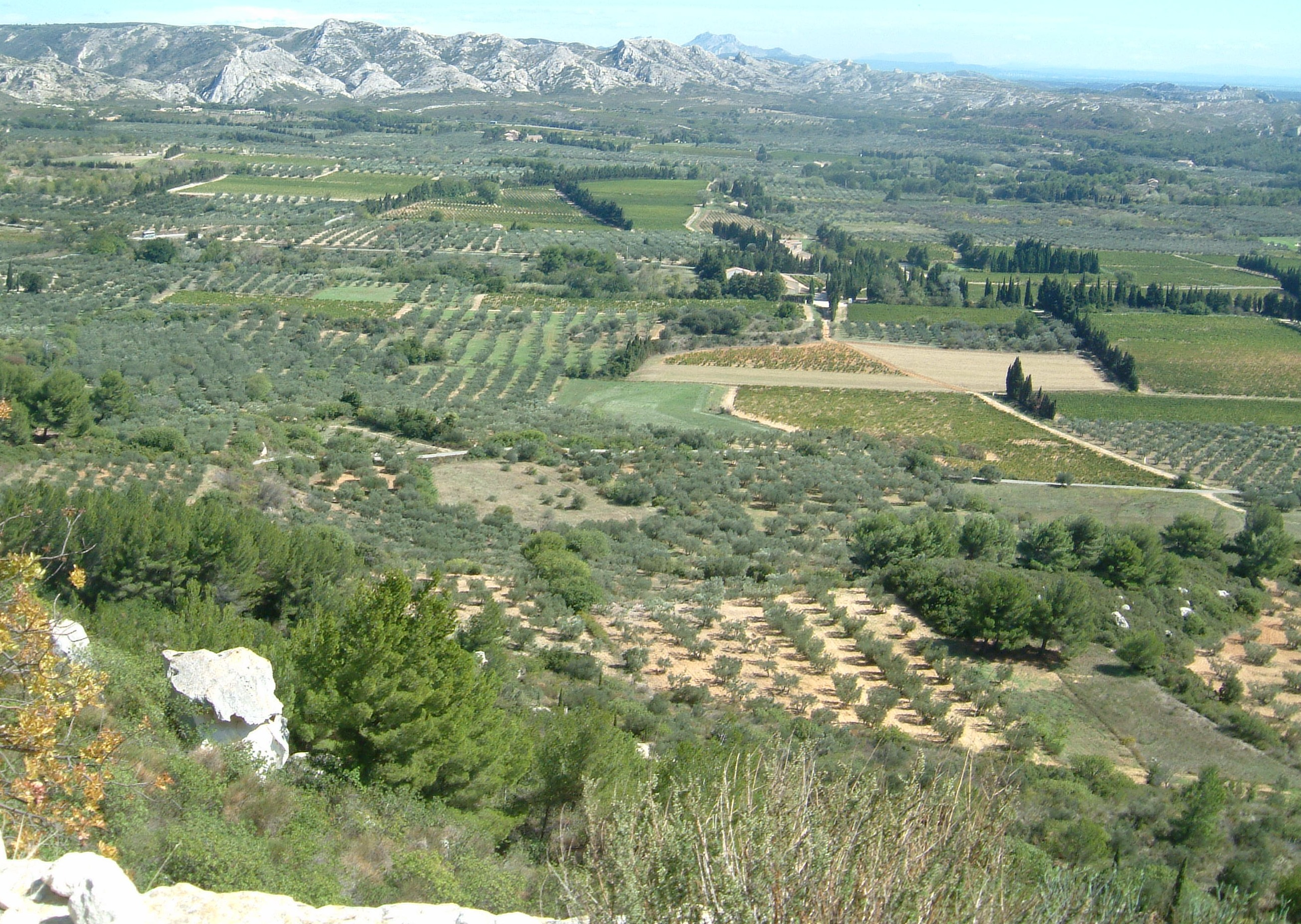 Blick von der Burgruine Les Baux-de-Provence auf die Alpilles (Südfrankreich).